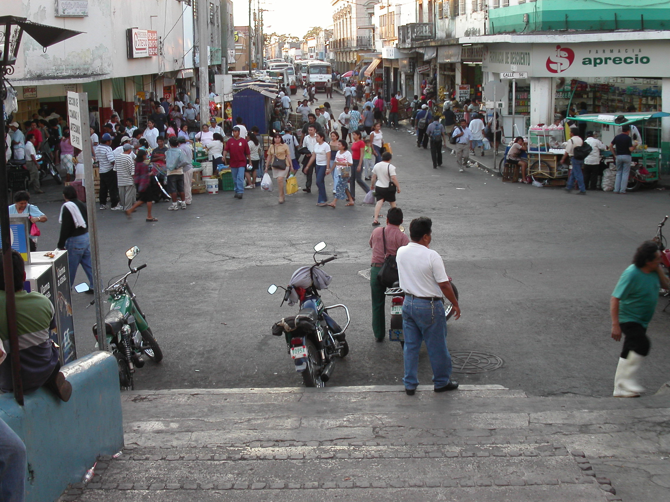 rue marchande et bus à Mérida auteur : utilisateur:Marc Mongenet date : février 2003 licence